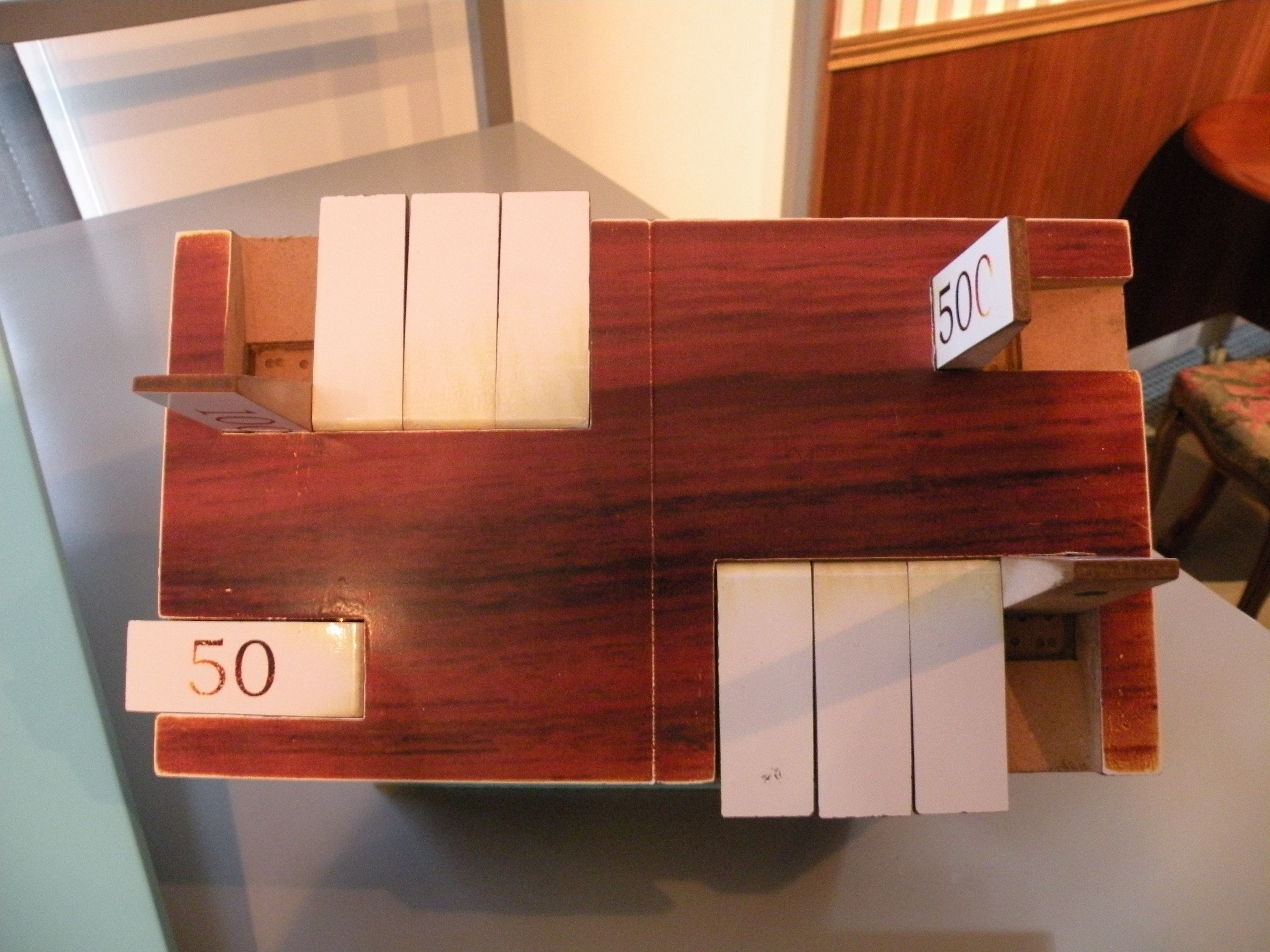 marque a jouer, qui sert à compter un peu comme un boulier, Musée de la Nacre et de la Tabletterie